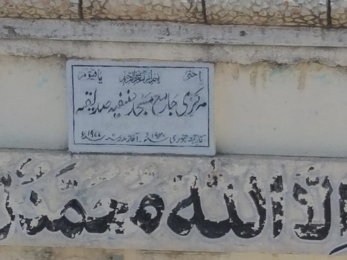 Central Mosque in Pind Begwal Islamabad